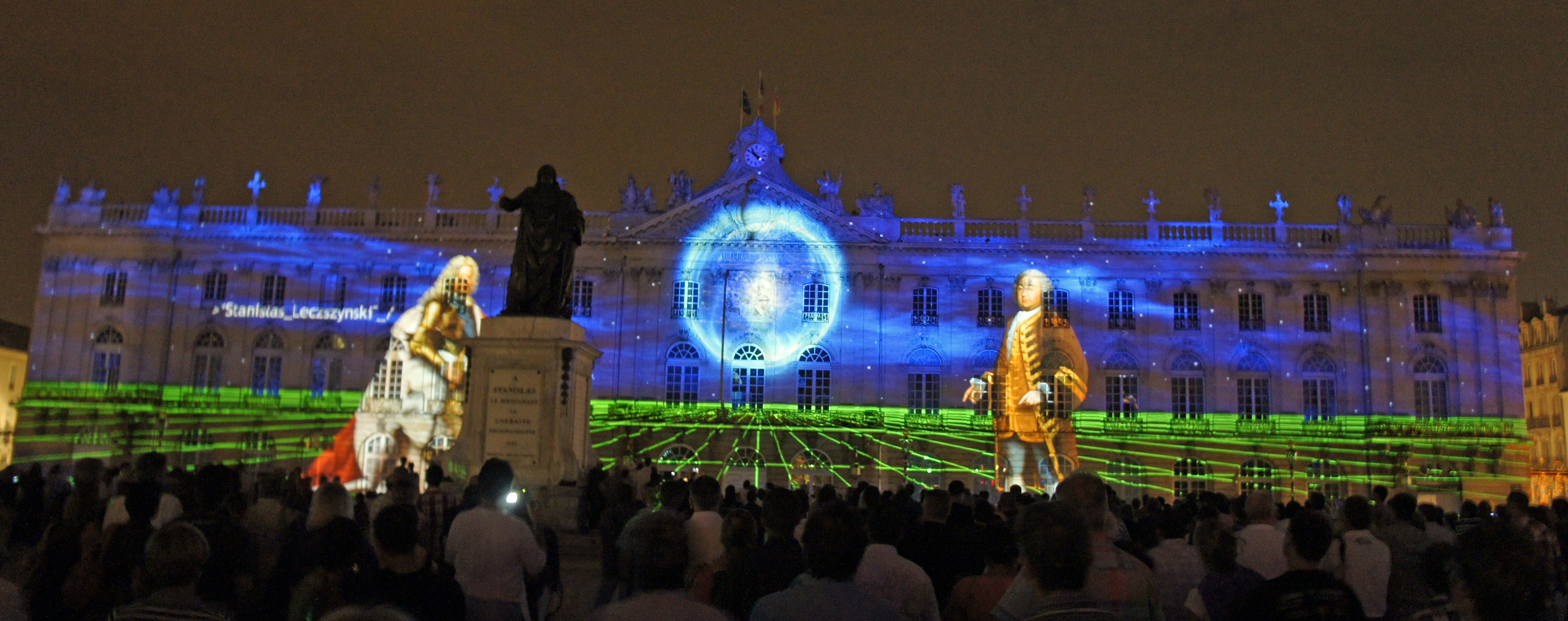 Spectacle nocturne en 2012. A gauche le roi Stanislas et à droite Héré.